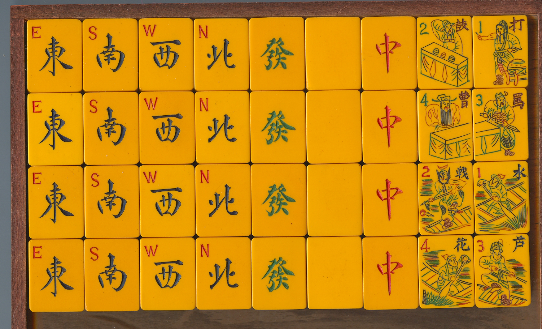 Foto van Mahjongstenen.